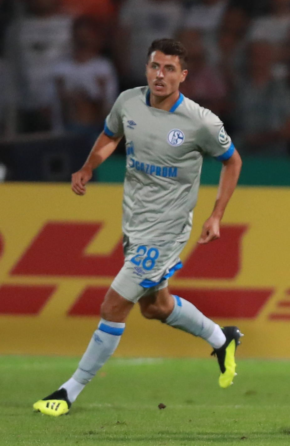 DFB-Pokal 2018/19, 1. Hauptrunde: 1. FC Schweinfurt 05 gegen FC Schalke 04 0:2 (0:1)